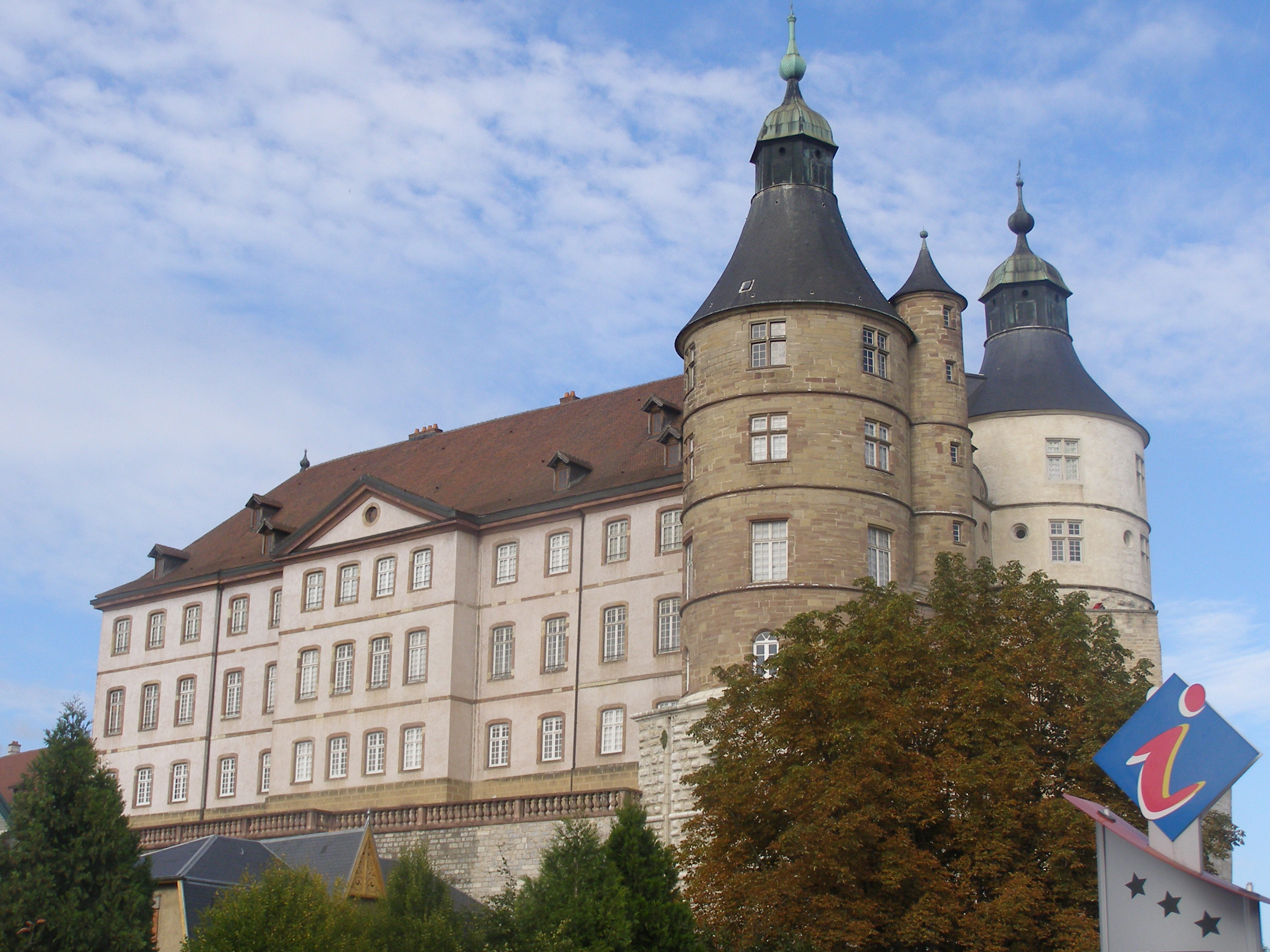 Château de Montbéliard (Doubs) .